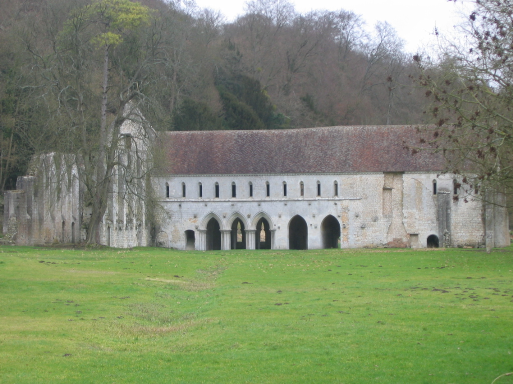 Abbaye de Fontaine Guérard, Eure, sur l'Andelle